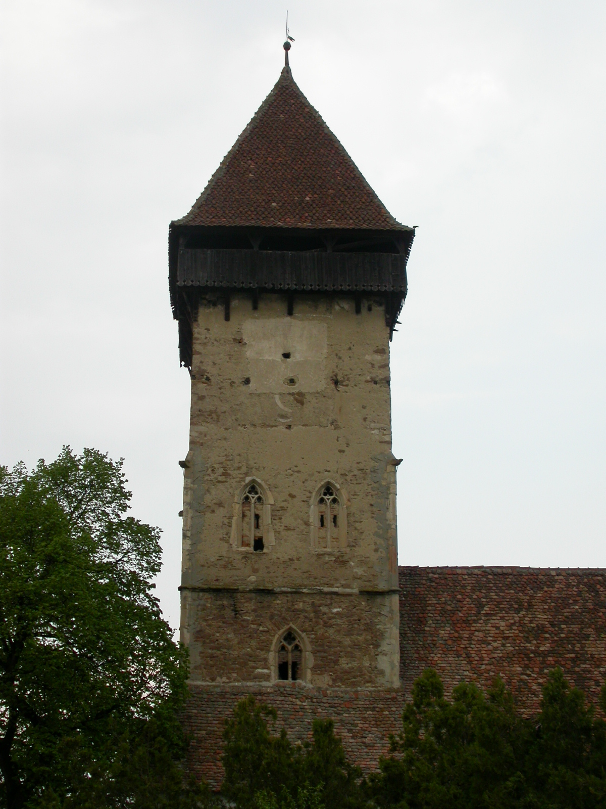 Ansamblul bisericii evanghelice fortificate, sec. XIV - XVII